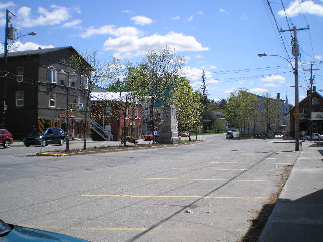 Le Carré de Danville